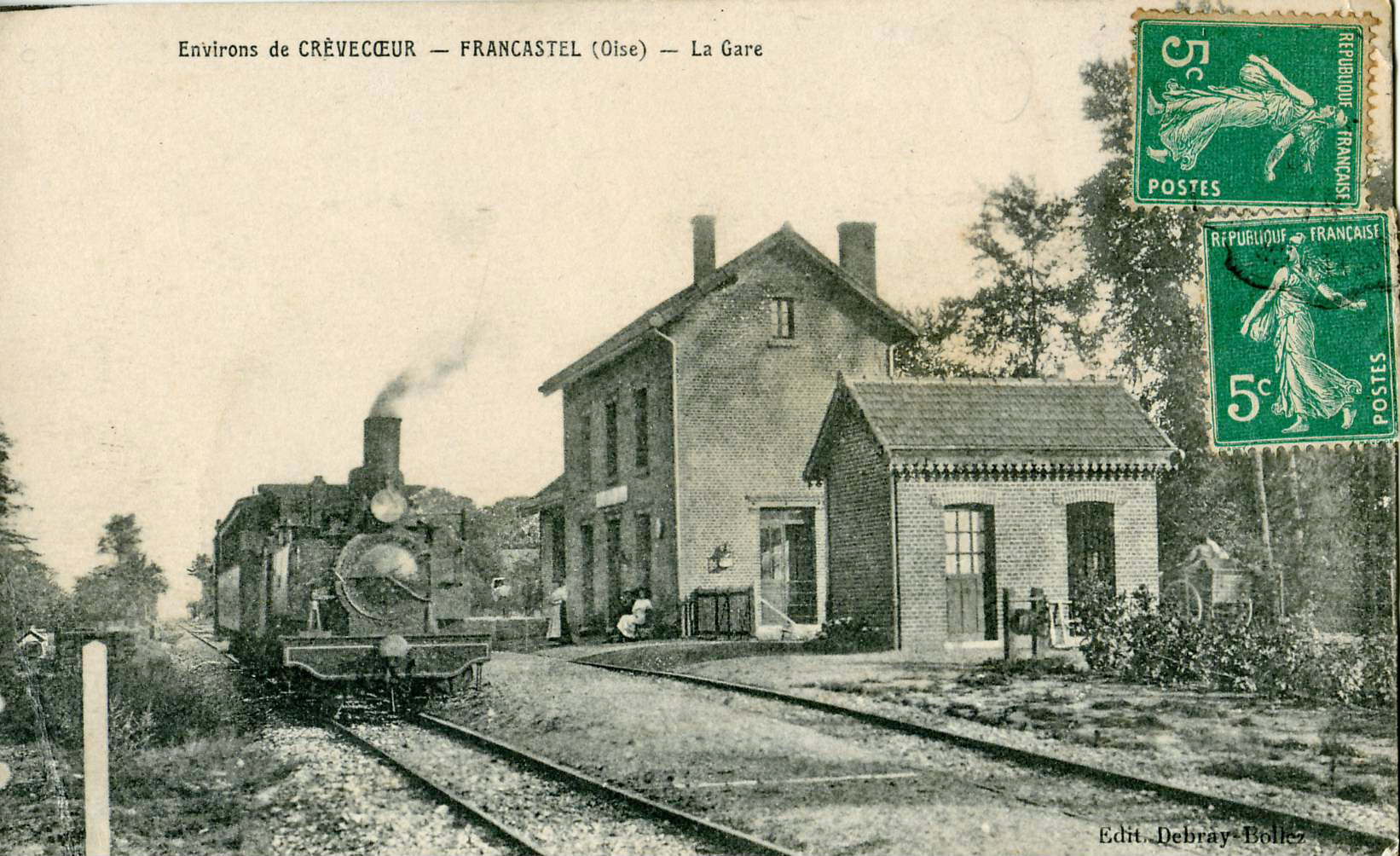 Carte postale ancienne éditée par Debray-Bollez :Environs de Crèvecœur - FRANCASTEL - La GareIl s'agit d'une gare de la ligne de chemin de fer secondaire à voie métrique Ligne Estrées-Saint-Denis - Froissy - Crèvecœur-le-Grand, avec une locomotive sur la voie principale.